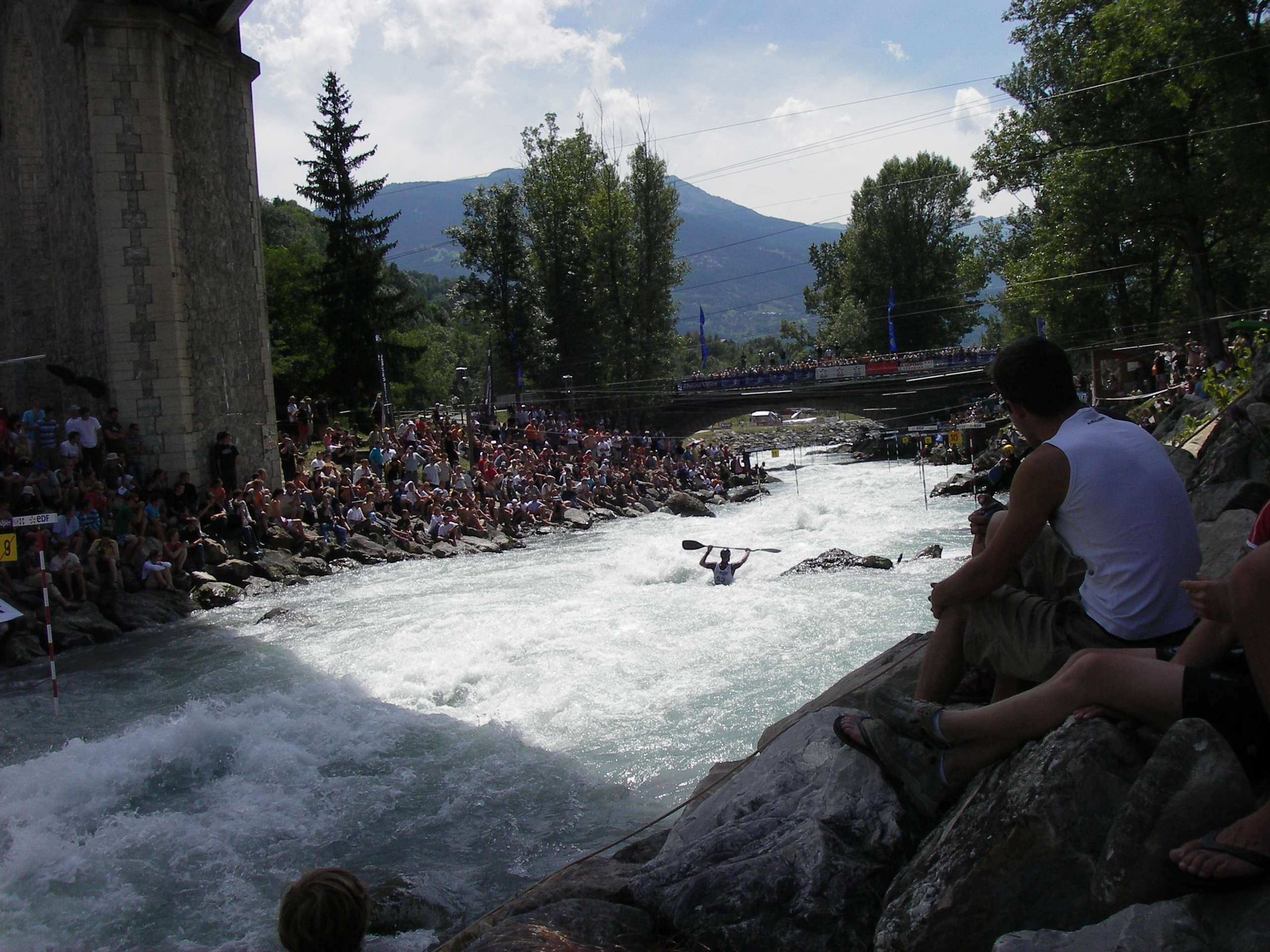 Julien Decarczyk sur les Championnats de France de Slalom de canoë-kayak 2017